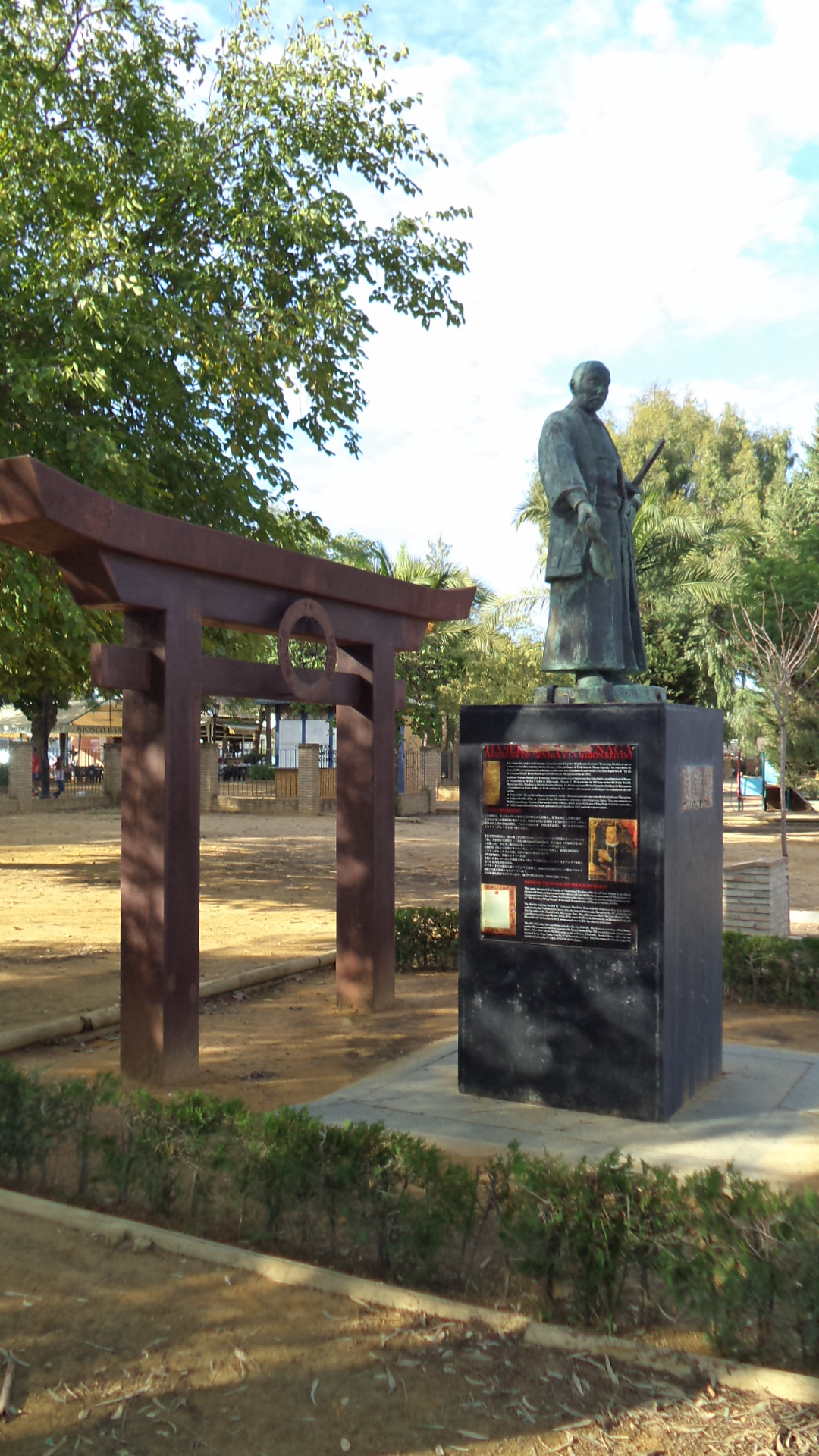 Monumento al samurai Hasekura Tsunenaga en la localidad de Coria del Río, provincia de Sevilla, España. La estatua fue regalada por el gobierno de Sendai a Coria en 1992